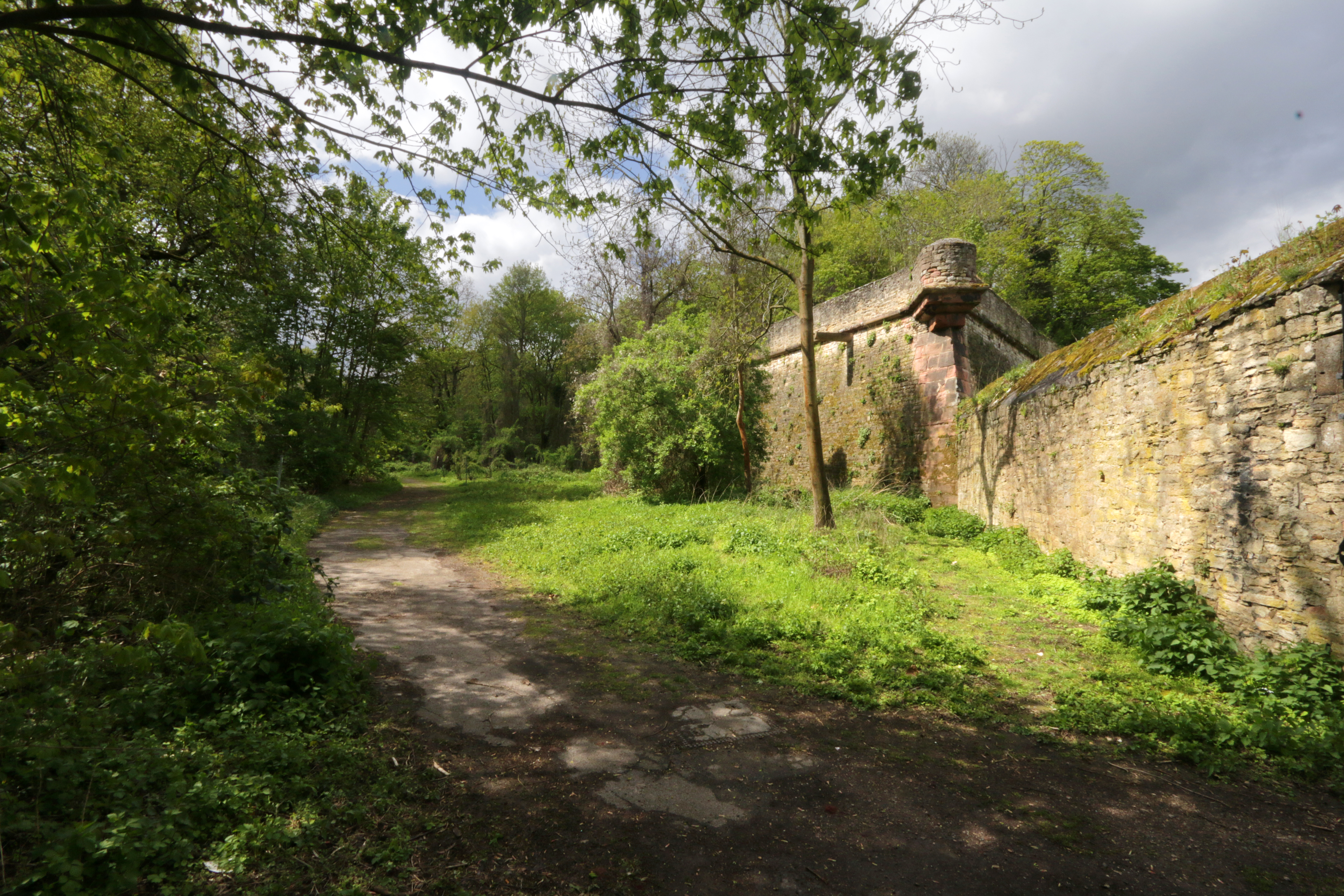 Im Geschützten Landschaftsbestandteil „Grünbestand der Zitadellenanlage mit Grabenbereich“ (Mainzer Zitadellengraben) in der Mainzer Innenstadt. Die historischen Mauern gelten als Stechimmen- und Moosbiotop von bundesweiter Bedeutung.